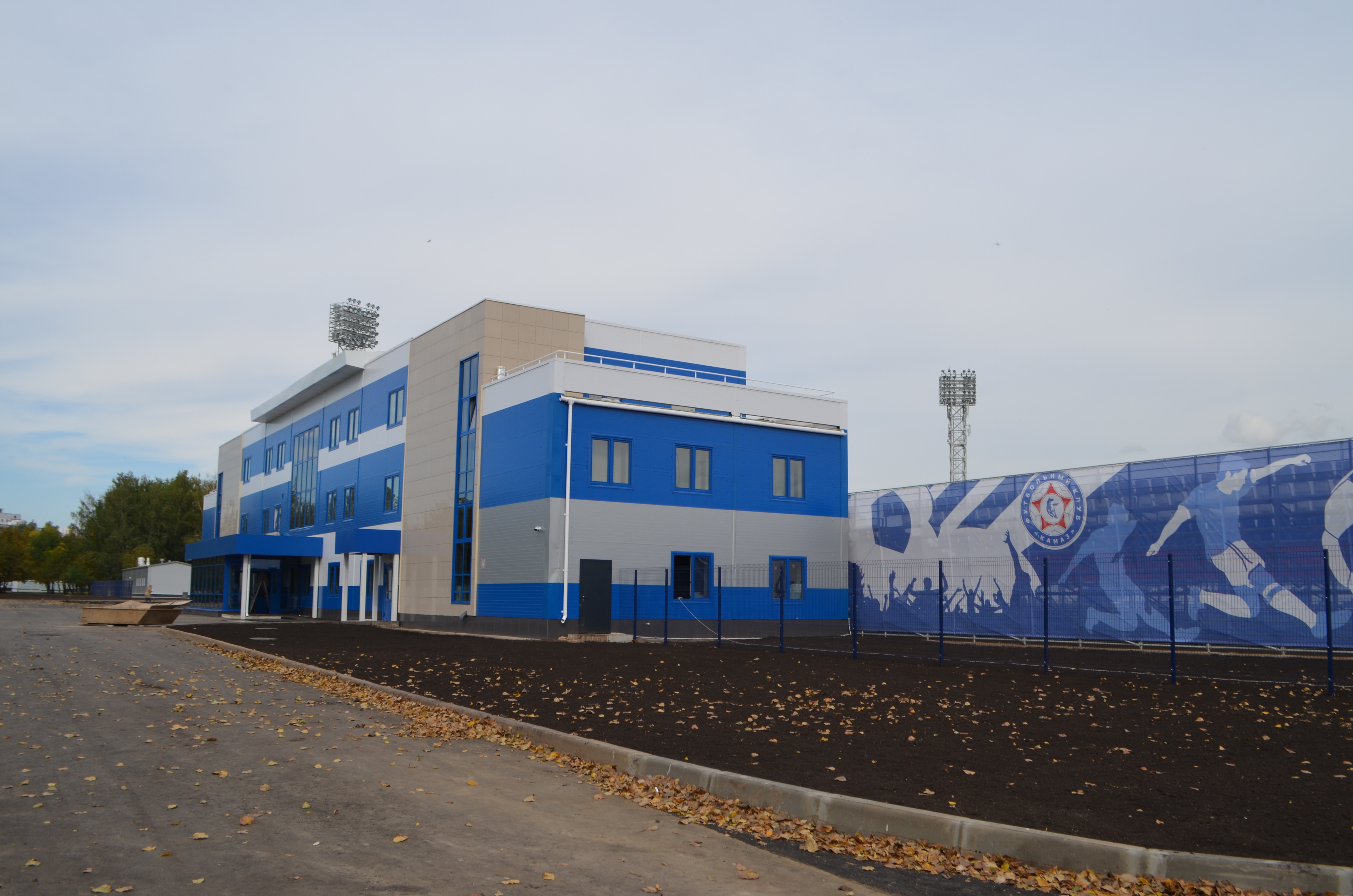 Административно-бытовой корпус стадиона "КАМАЗ" в Набережных Челнах.